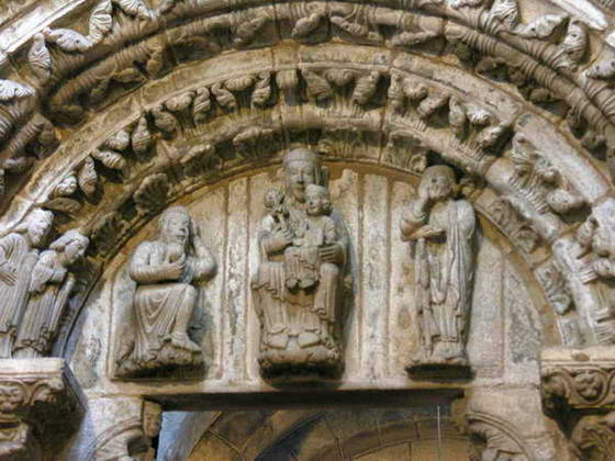 Igrexa da Corticela, Santiago de Compostela. Galicia Publish by= Luis Miguel Bugallo Sánchez. Self made